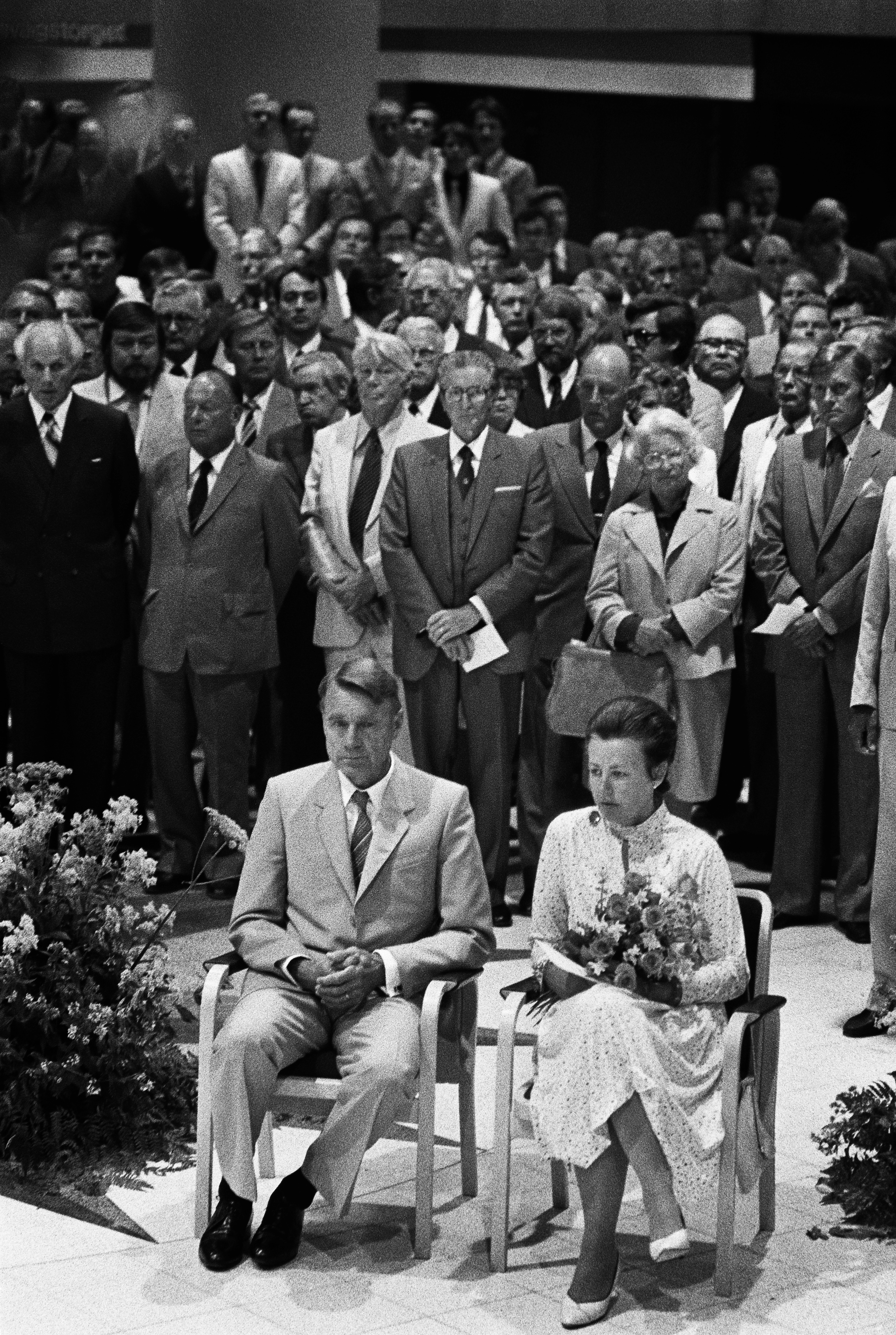 Helsingin metron avajaistilaisuus 2.8.1982. Presidenttipari Mauno ja Tellervo Koivisto istumassa kunniapaikoilla metron avajaisissa. Taustalla avajaistilaisuuden vieraita.